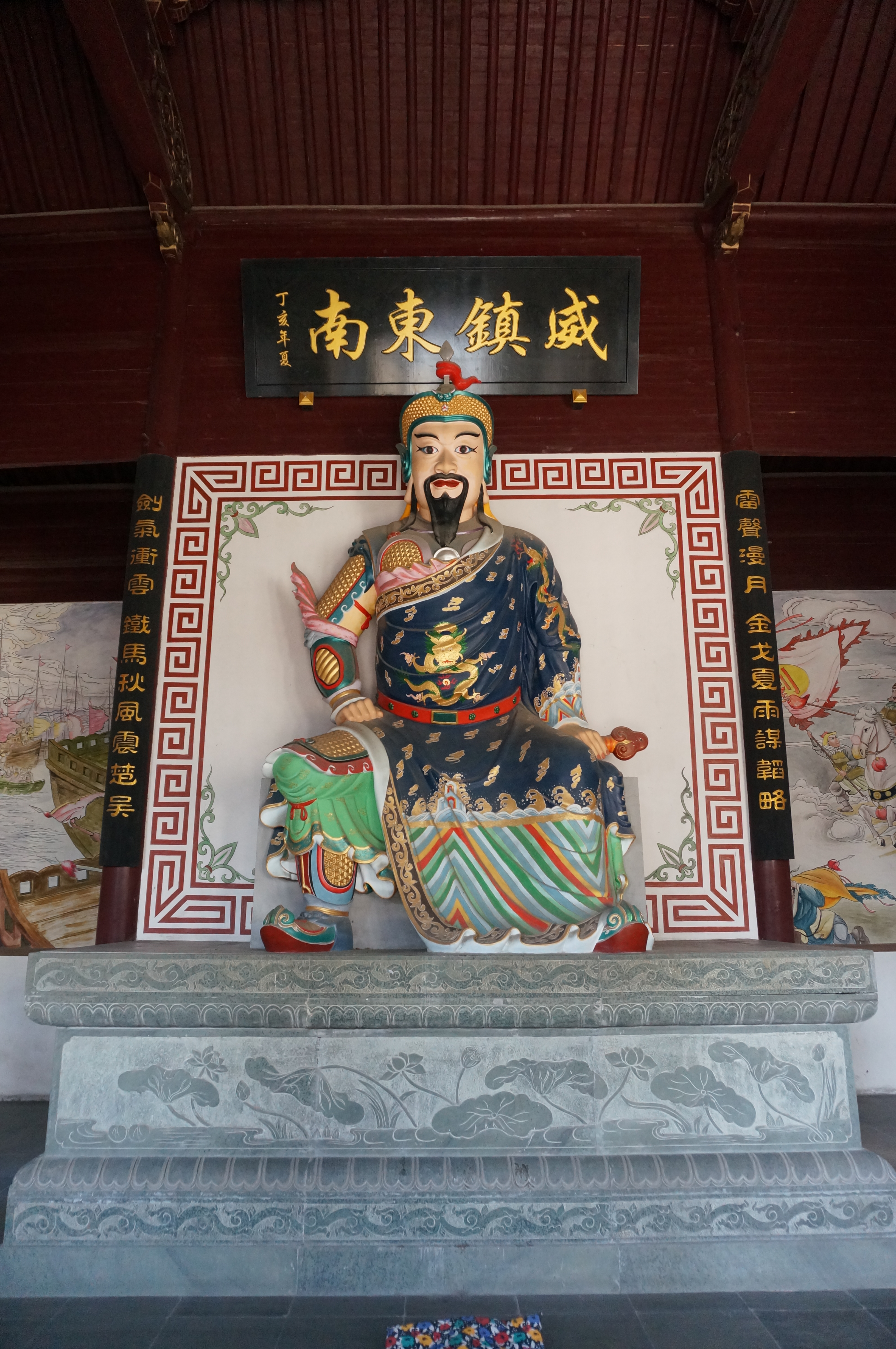 德清新市镇刘王庙，大殿内刘锜像。